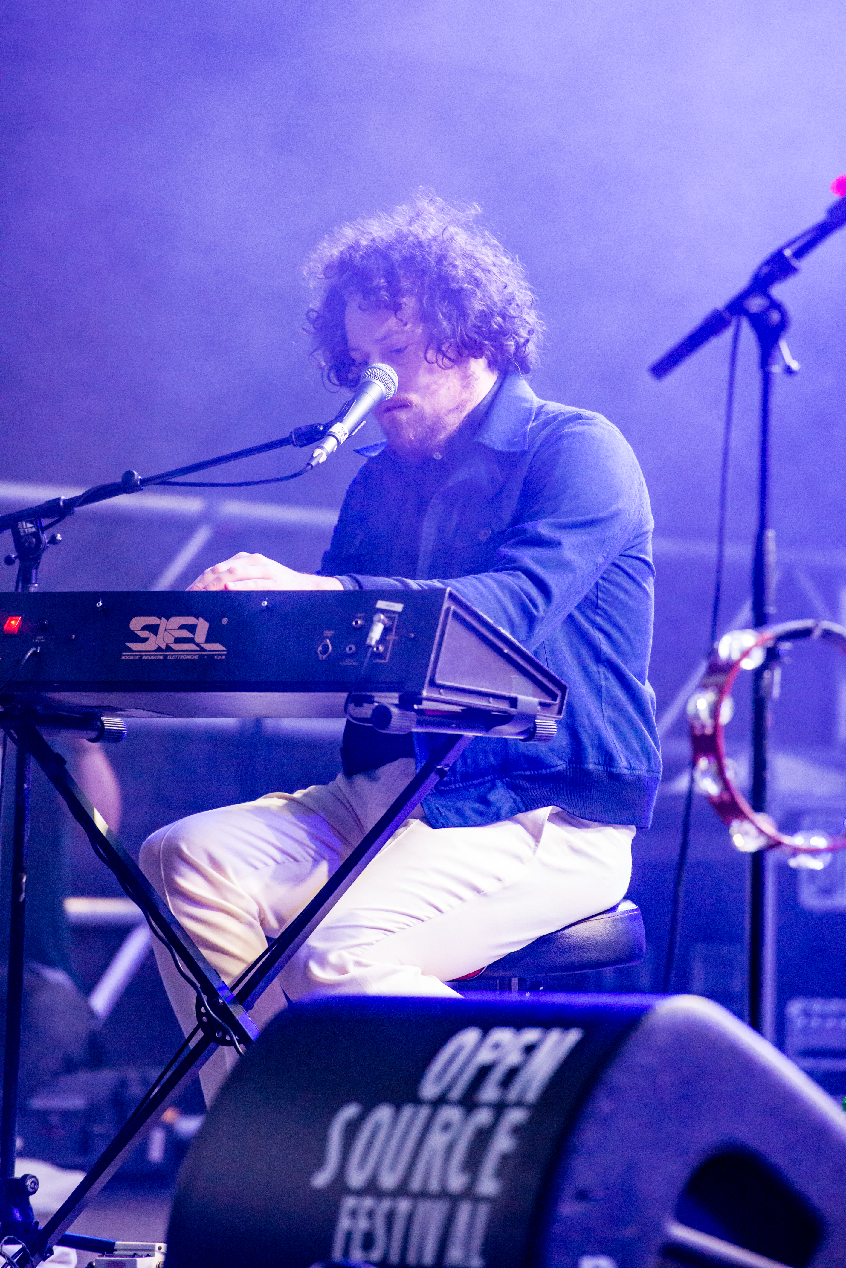 'Open Source Festival 2015; Düsseldorf Galopprennbahn': 'Metronomy'